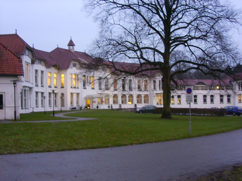 Het sanatorium